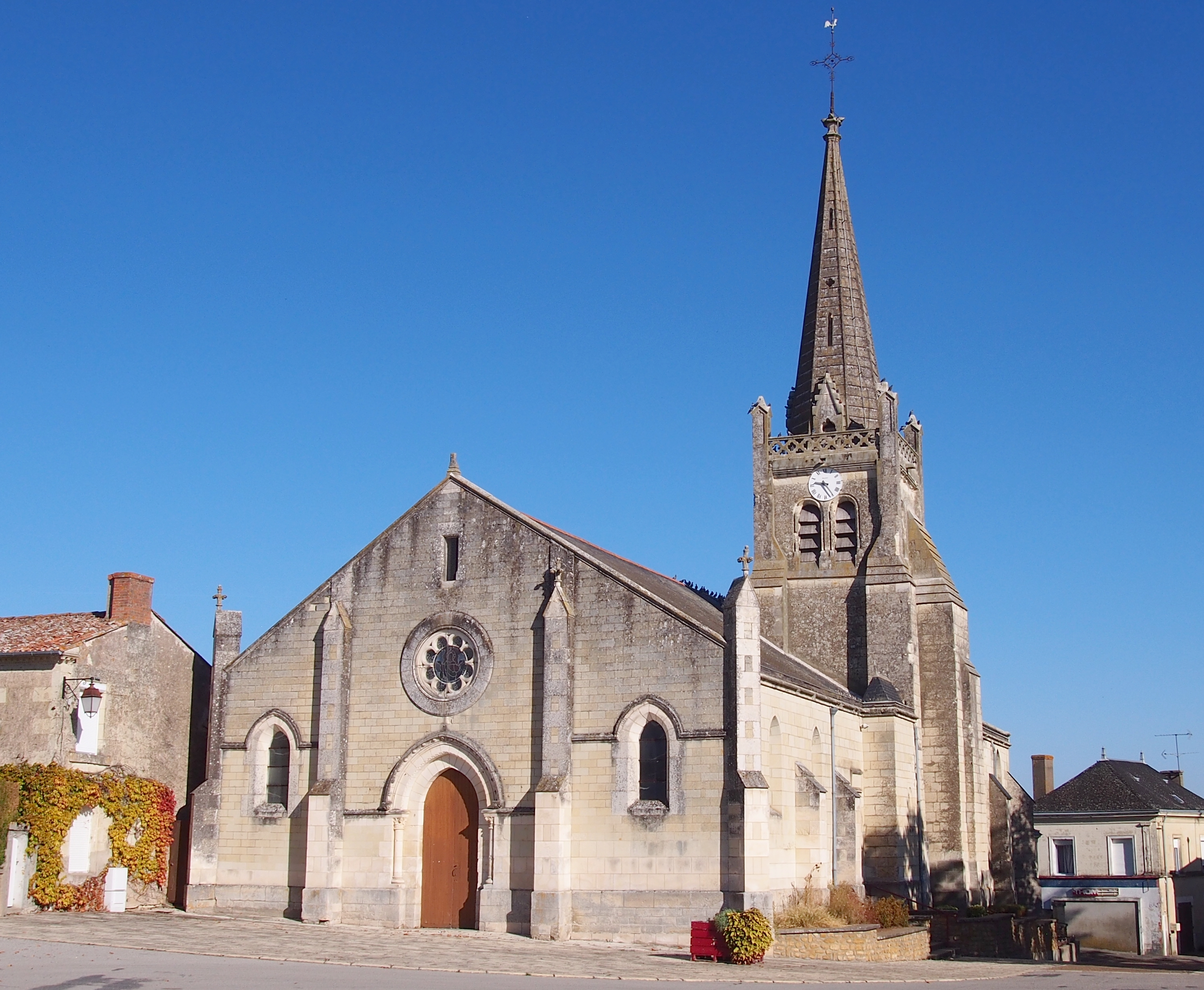 Bouillé-Loretz (Nouvelle-Aquitaine, France). L'église Saint-Pierre-ès-Liens.